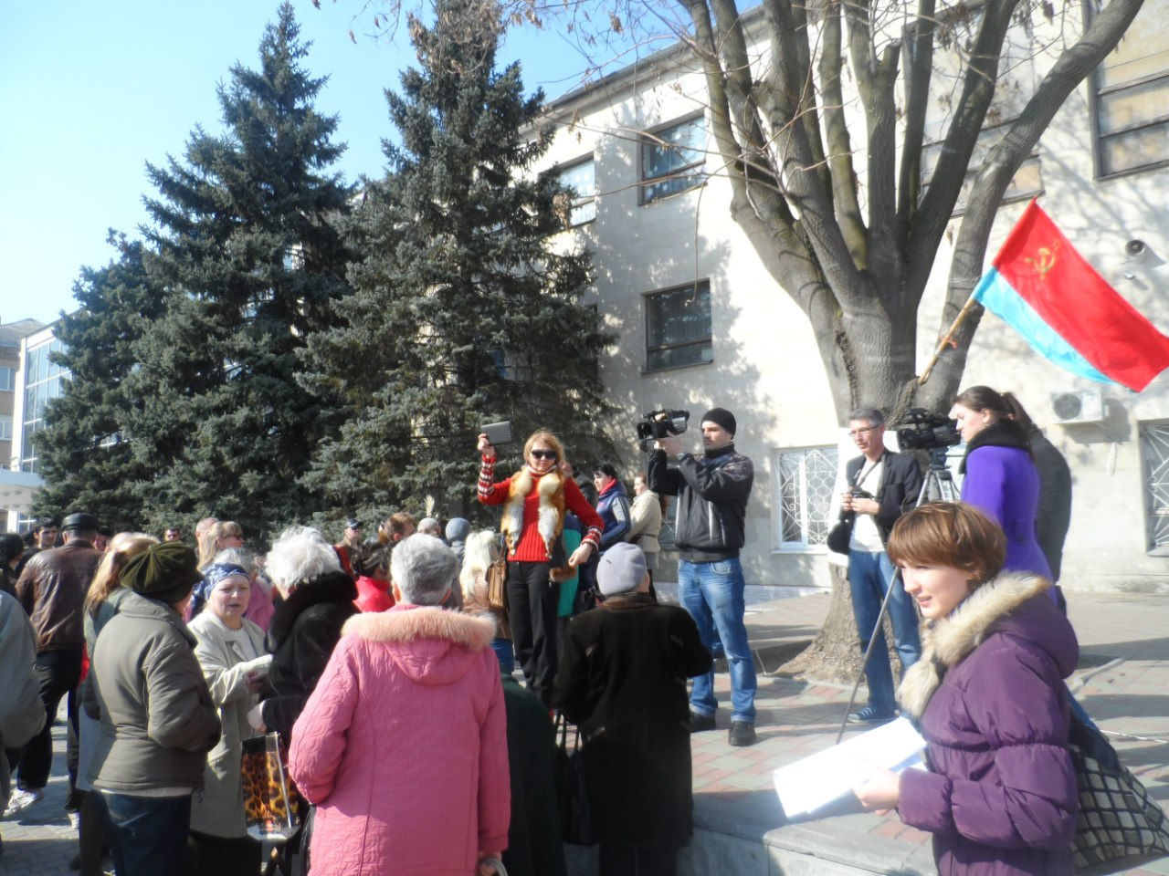 Митинг